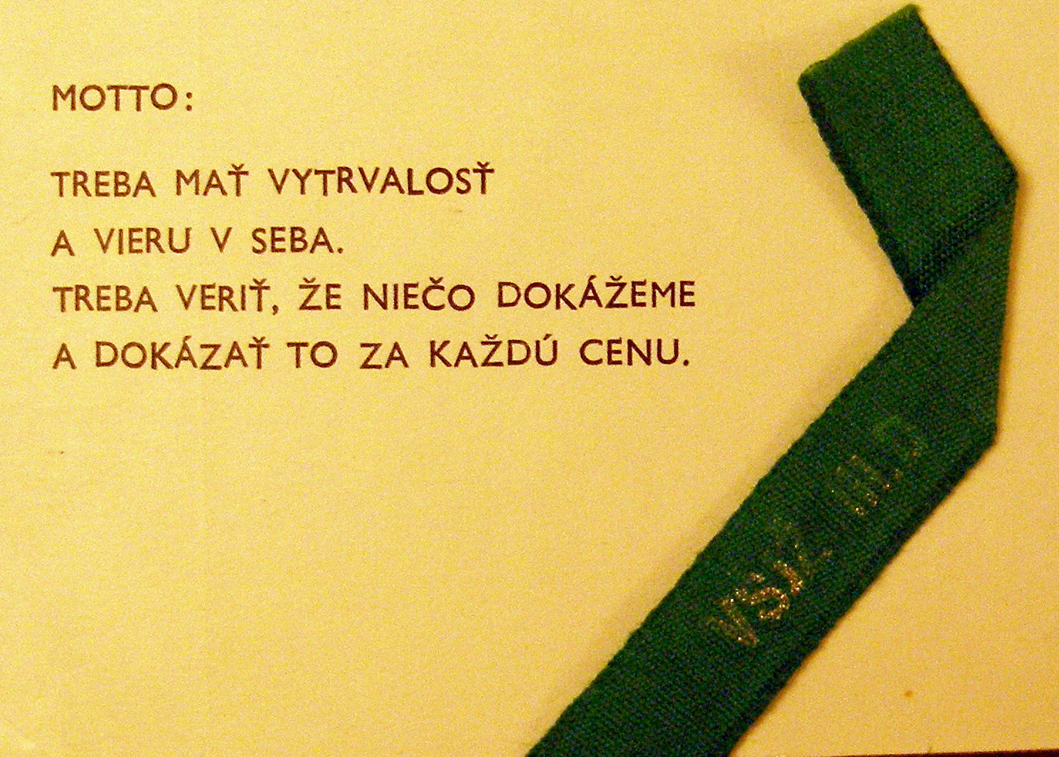 Rok 1965. Pozdrav z predmaturitného večierku -detail. Vojenská škola Jana Žižku z Trocnova v Bratislave.